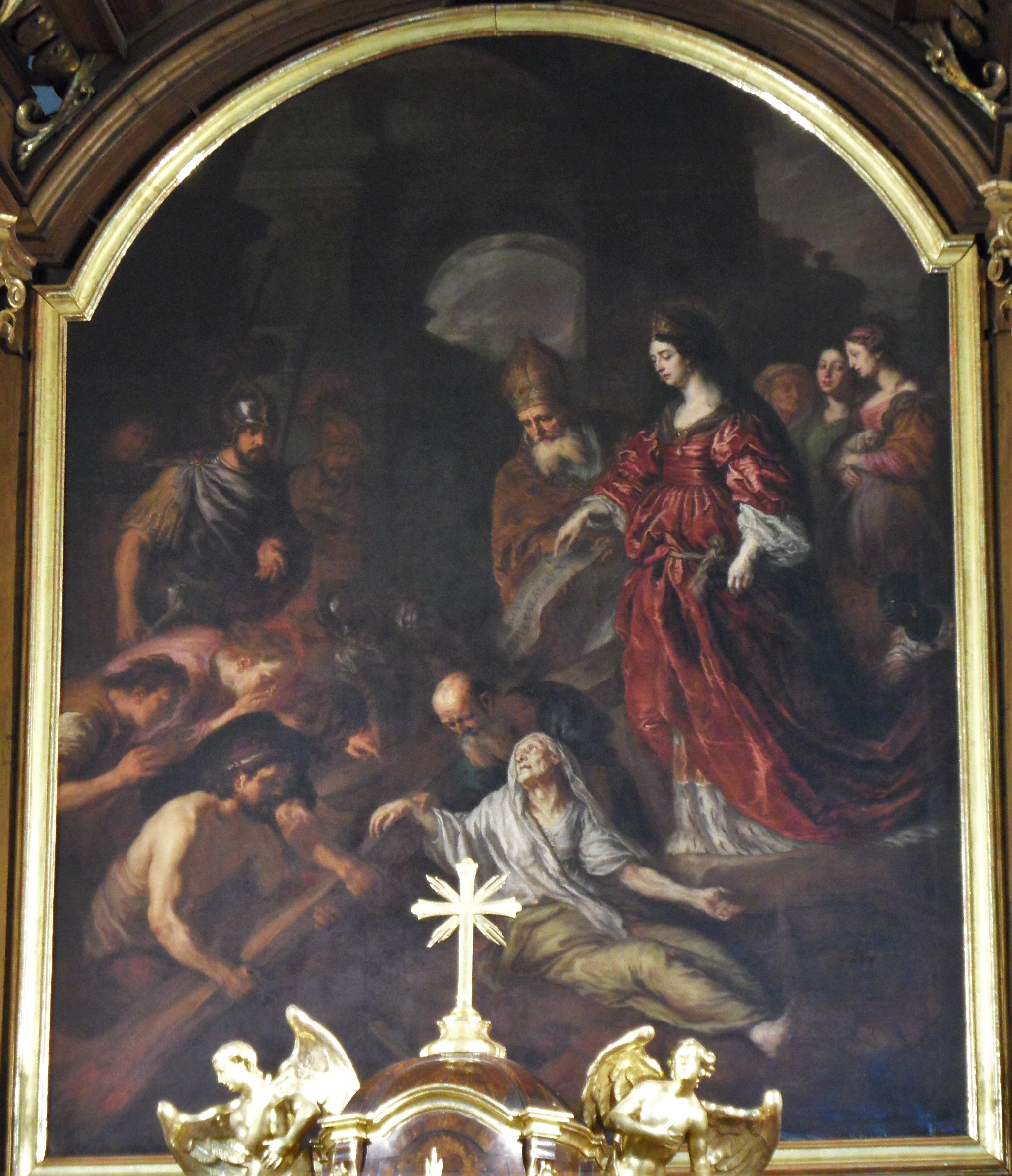 Nalezení svatého Kříže císařovnou Helenou - Joachim von Sandrart (1655), kostel Nalezení sv. Kříže, Brno, hlavní oltář